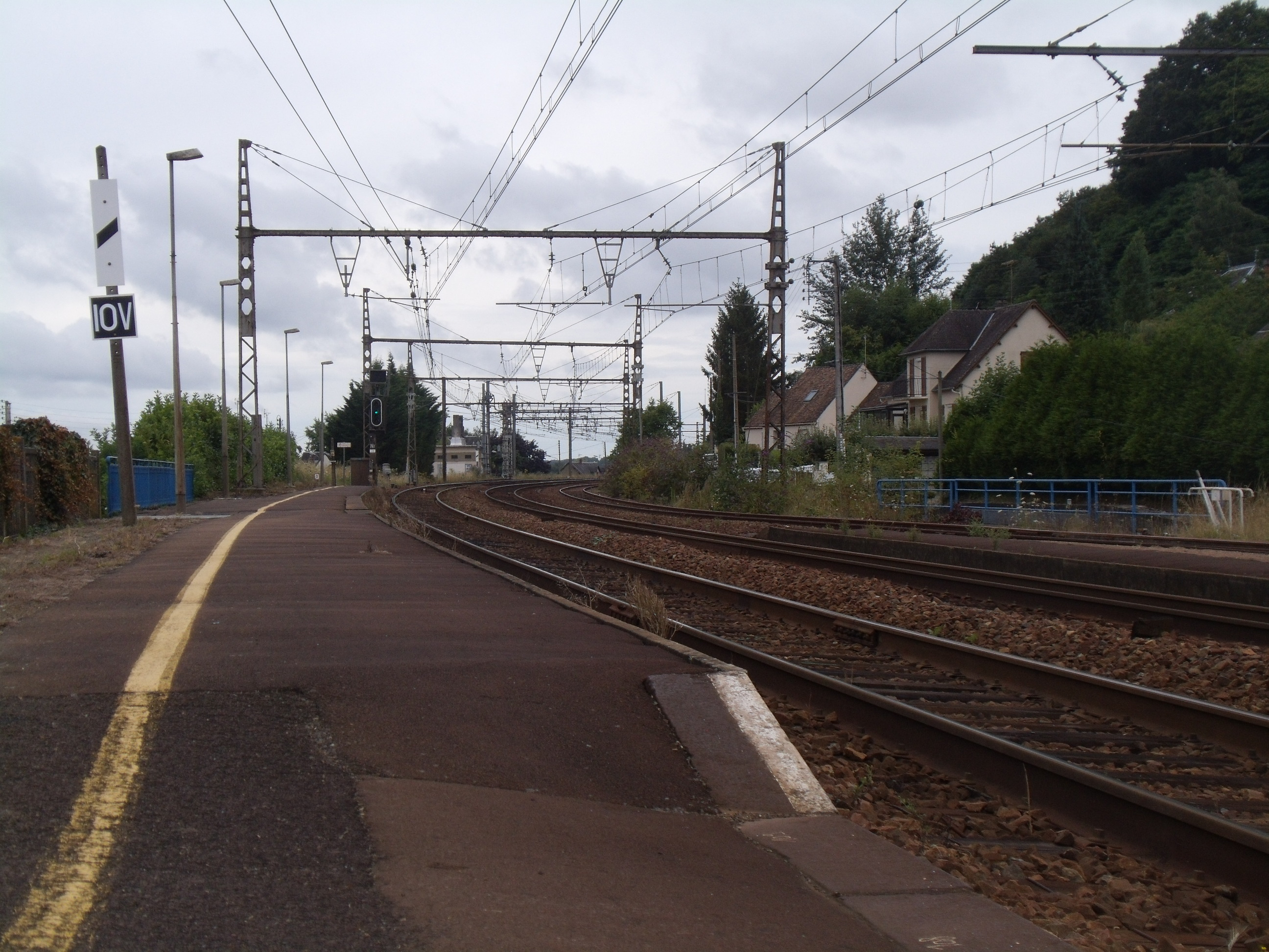 Les voies de la gare de La Ferté-Bernard vues en direction du Mans.